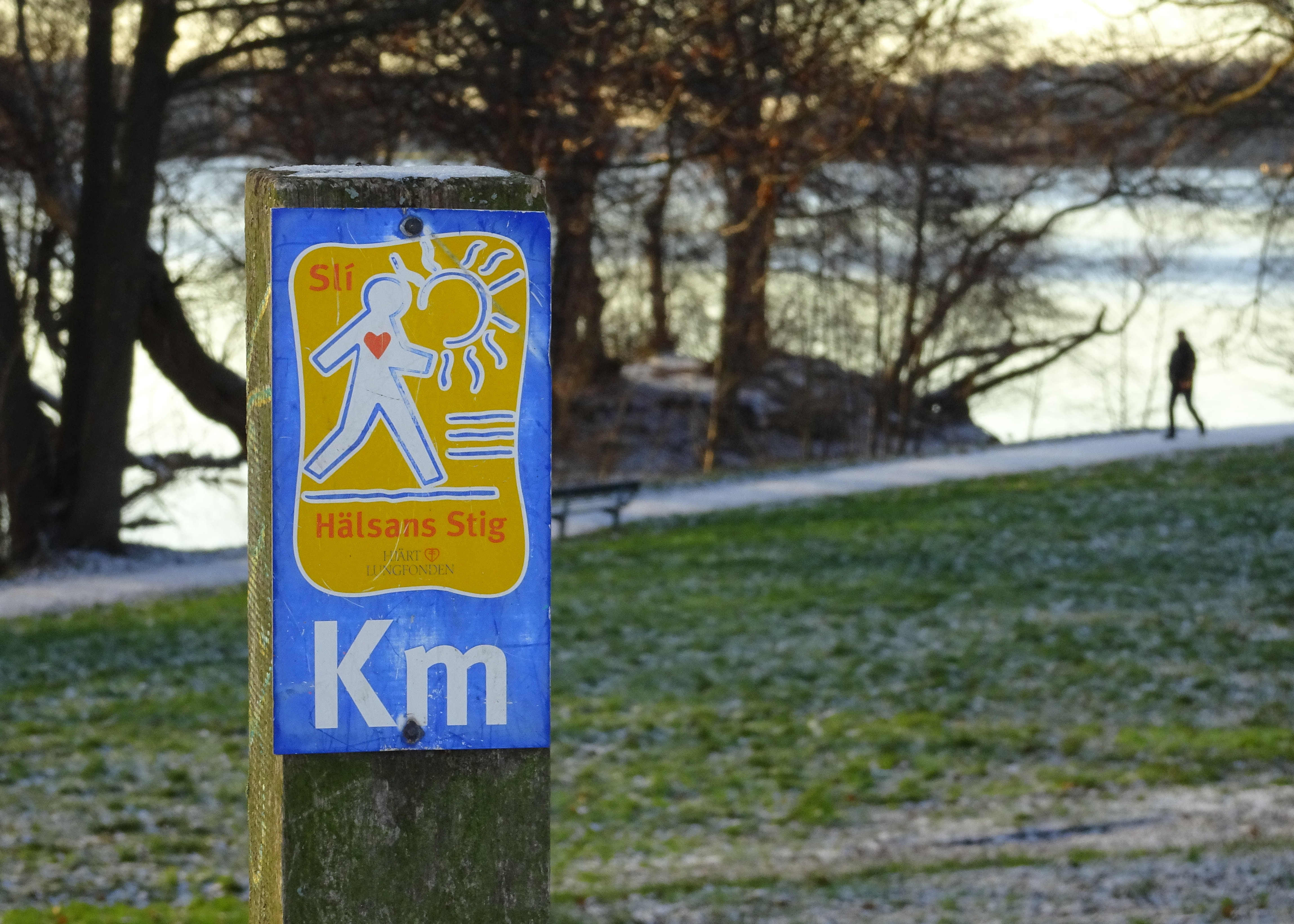 Hälsans stig på Smedsudden